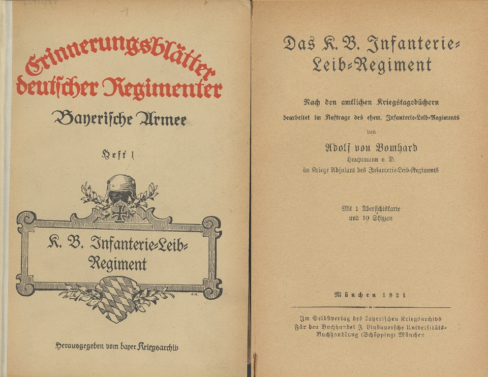 Umschlag und Titelblatt eines Bandes der bayerischen Reihe in Erinnerungsblätter deutscher Regimenter